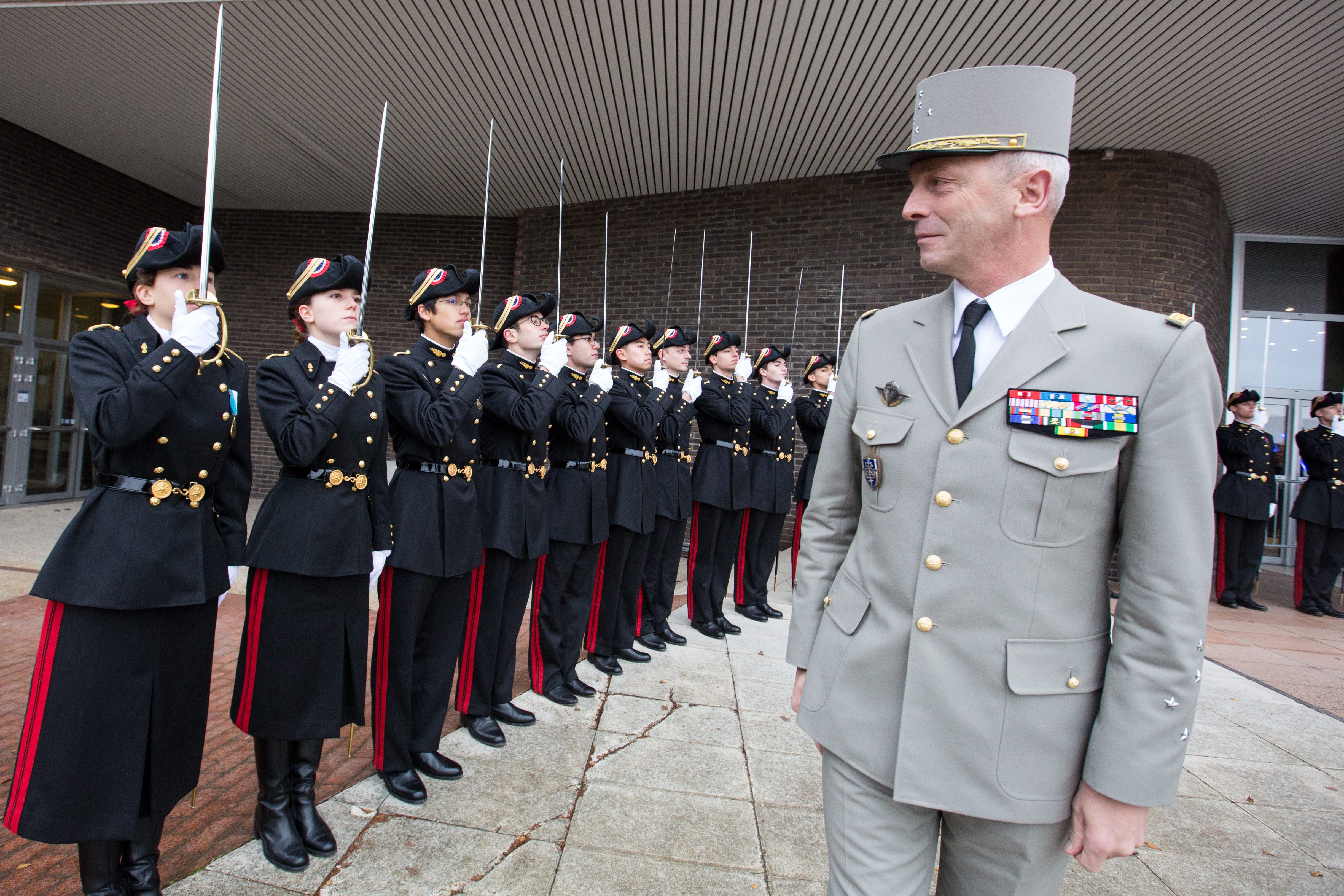 Visite du Général d'armée François Lecointre, chef d'État-Major des armées (CEMA) à l'Ecole polytechnique à l'occasion du Forum 2017 de la DGA